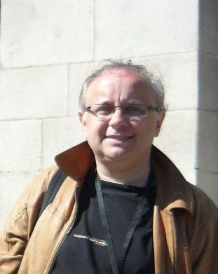 Alois Sassmann v květnu 2009